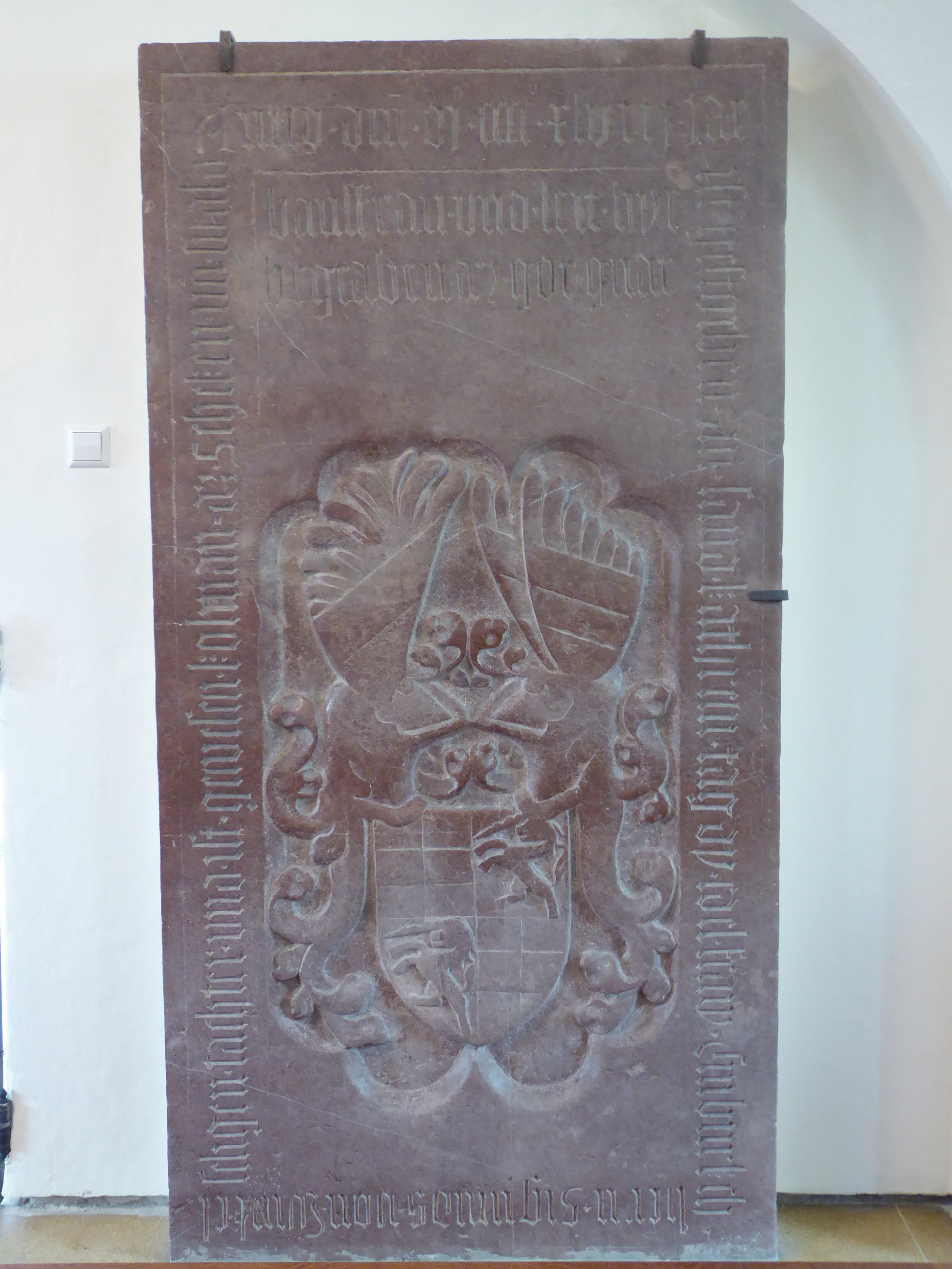 Pfarrkirche, Aggsbach Markt, Niederösterreich - Grabstein (für Cimburg von Winkl, 1448) unter der Orgelempore